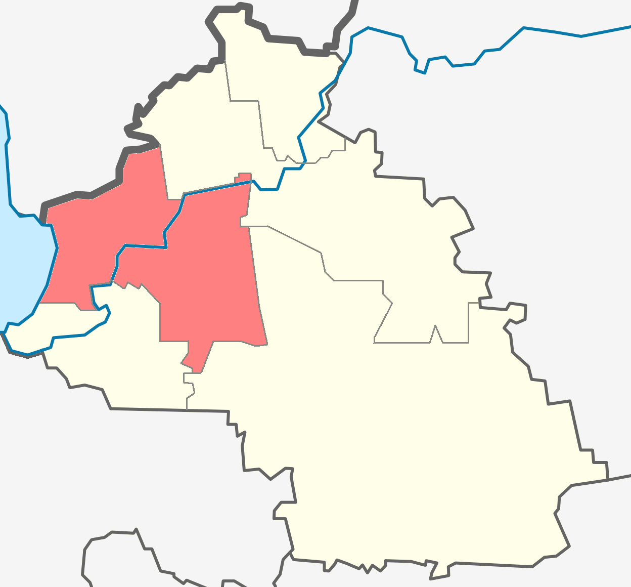 Лодейнопольское городское поселение.